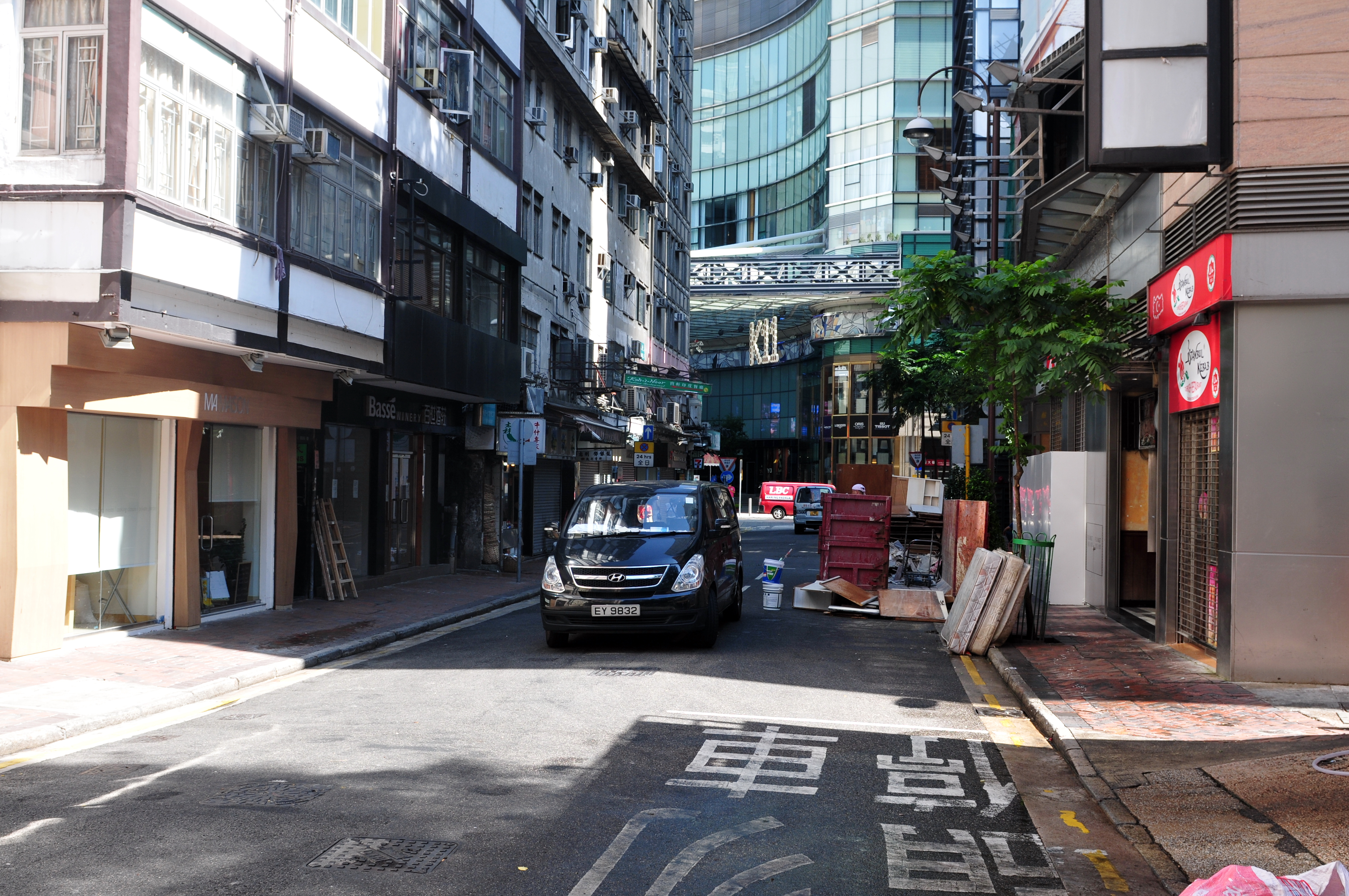 Wikimania 2013 Hongkong